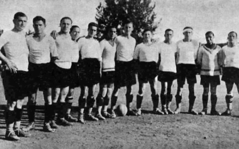 Primer equip del Granollers Sport Club artífex de l'ascens a la Segona Categoria Preferent.